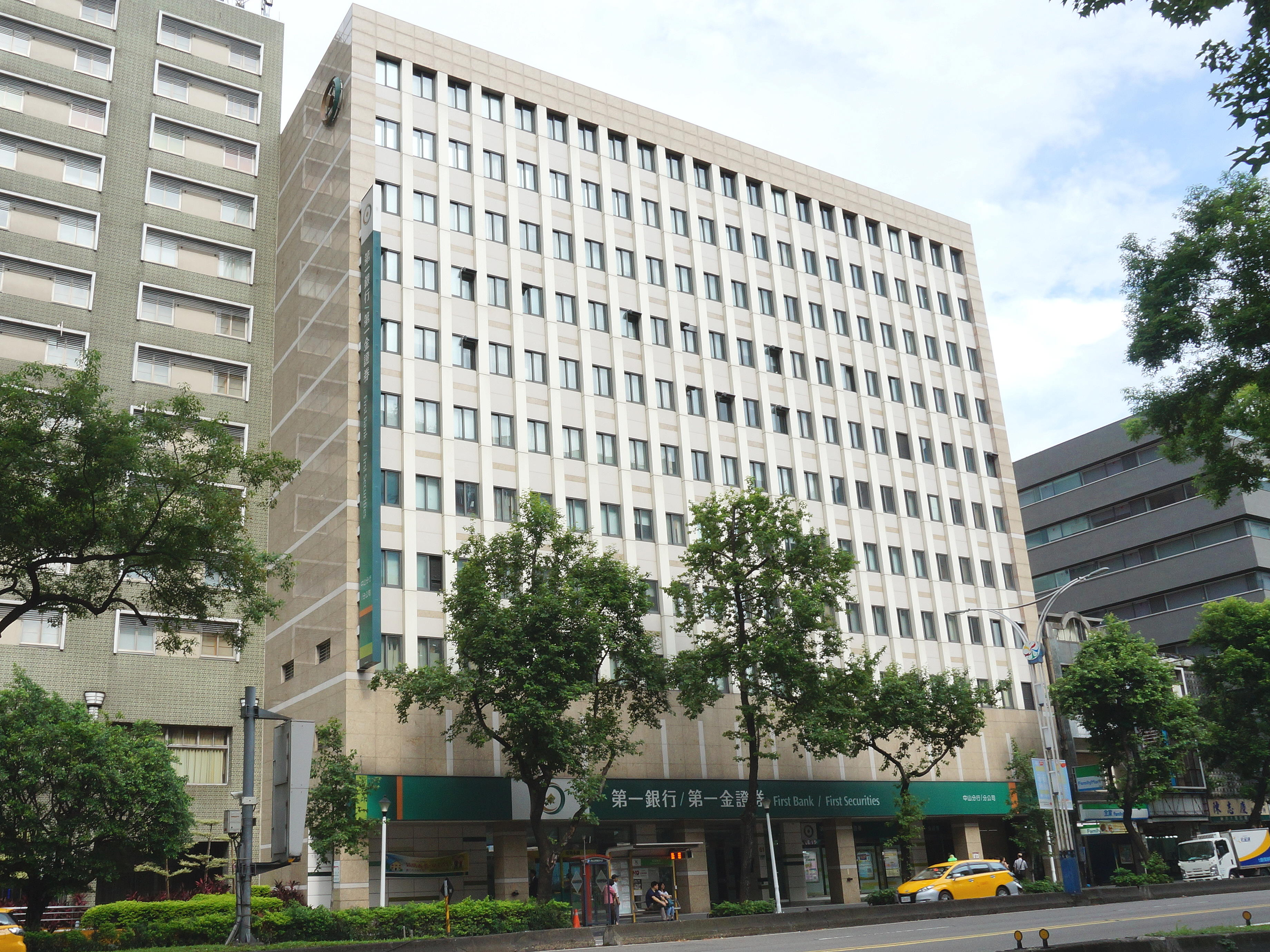 第一銀行中山大樓，位於臺北市中山區中山北路二段61號。